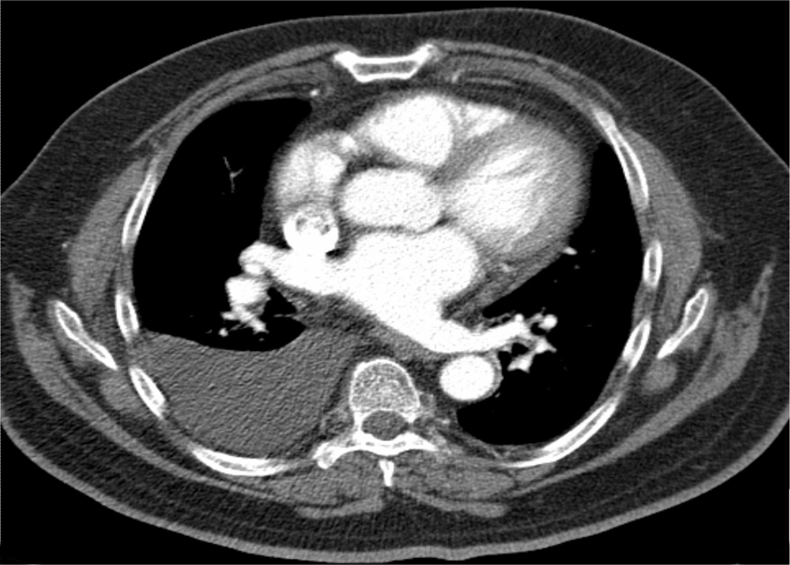 Pleuraerguss in der Computertomographie axial Weichteilfenster rechte Pleurahöhle (links im Bild). Die Flüssigkeit sammelt sich beim liegenden Patienten dorsal. Die CT Dichte liegt bei Werten gering über 0 Hounsfield-Einheiten.